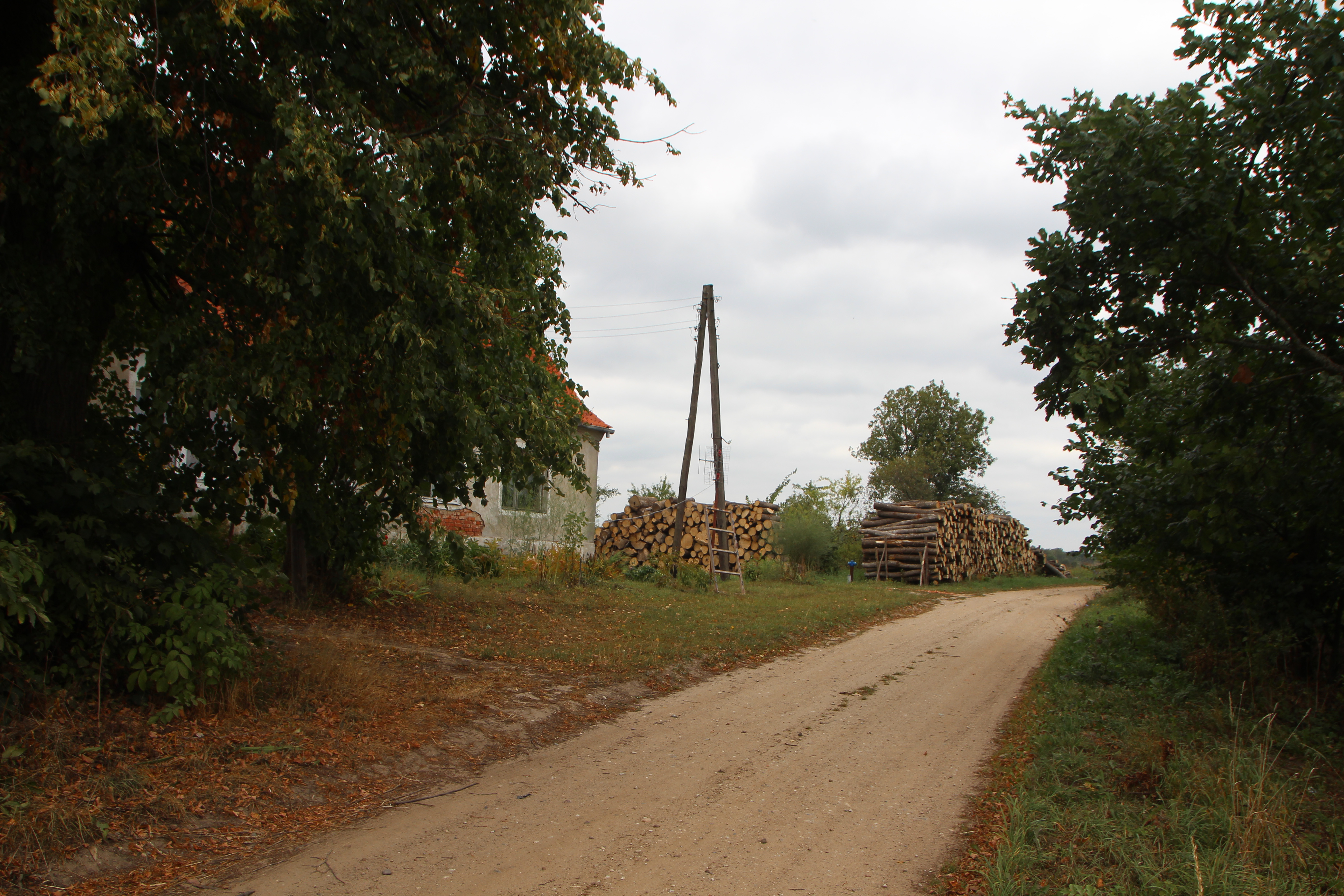 Górki wieś w Polsce w województwie warmińsko-mazurskim, w powiecie kętrzyńskim, w gminie Barciany.